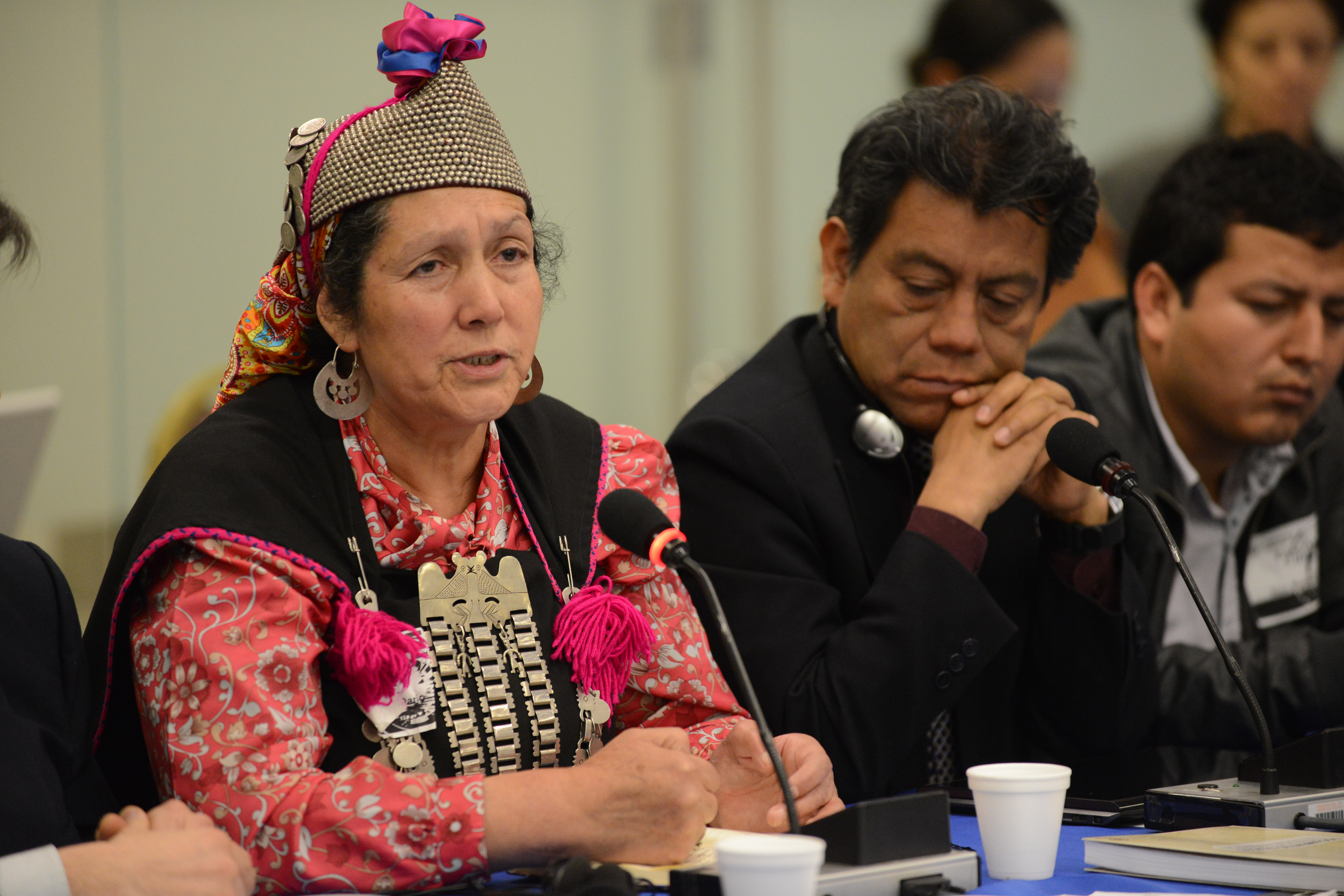 156 Período Ordinario de Sesiones 19 de octubre de 2015 Hablando en el micrófono, peticionaria de la audiencia, Juana Calfungo, Comunidad Mapuche Crédito de la foto: Daniel Cima